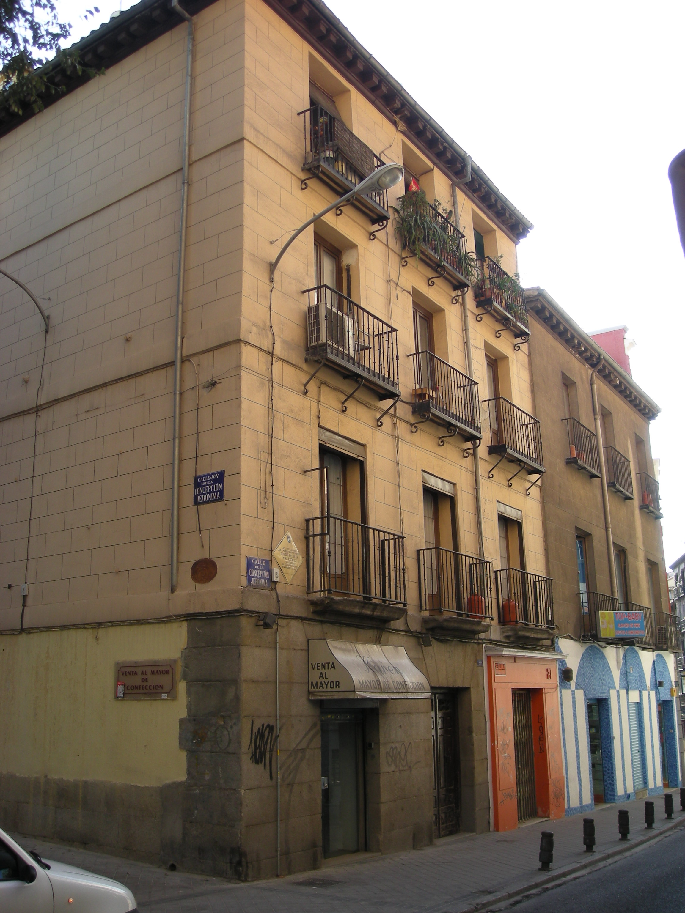 Lugar donde estuvo situada la casa de Diego Velázquez desde su establecimiento en Madrid en 1623. Calle Concepción Jerónima.